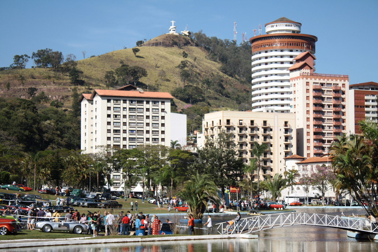 Águas de Lindóia - SP Expo Carros Antigos 2011